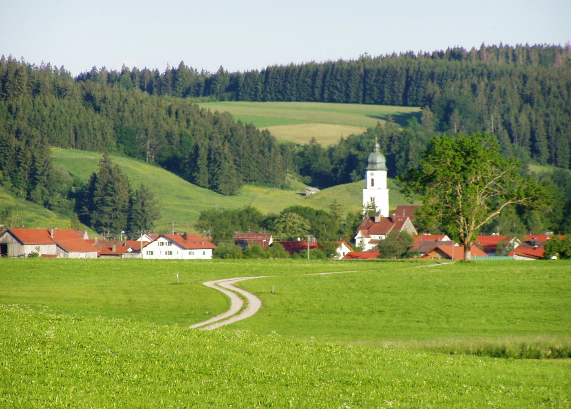 Bidingen